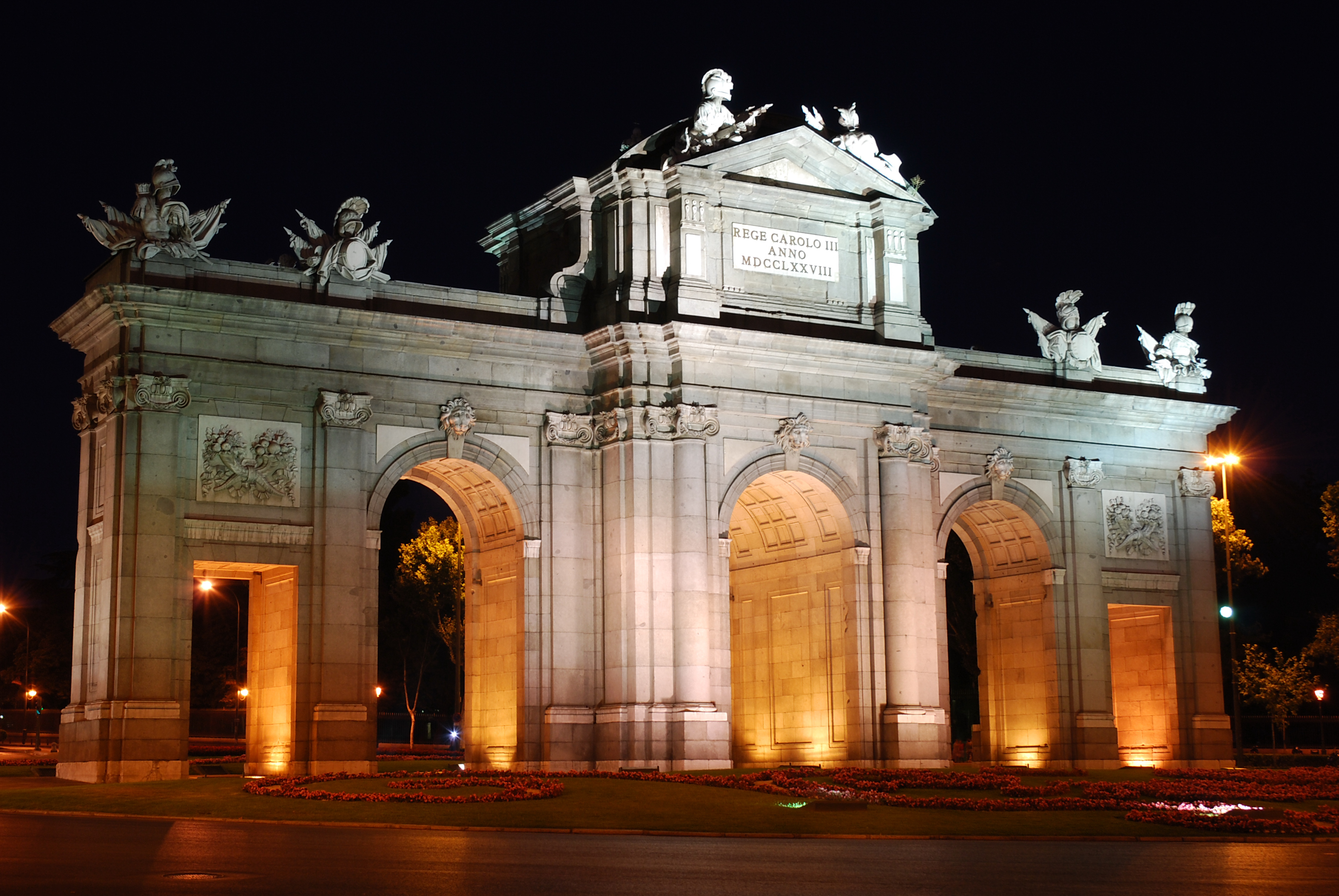 Puerta de Alcalá ("Alcalá Gate") in Madrid, Spain